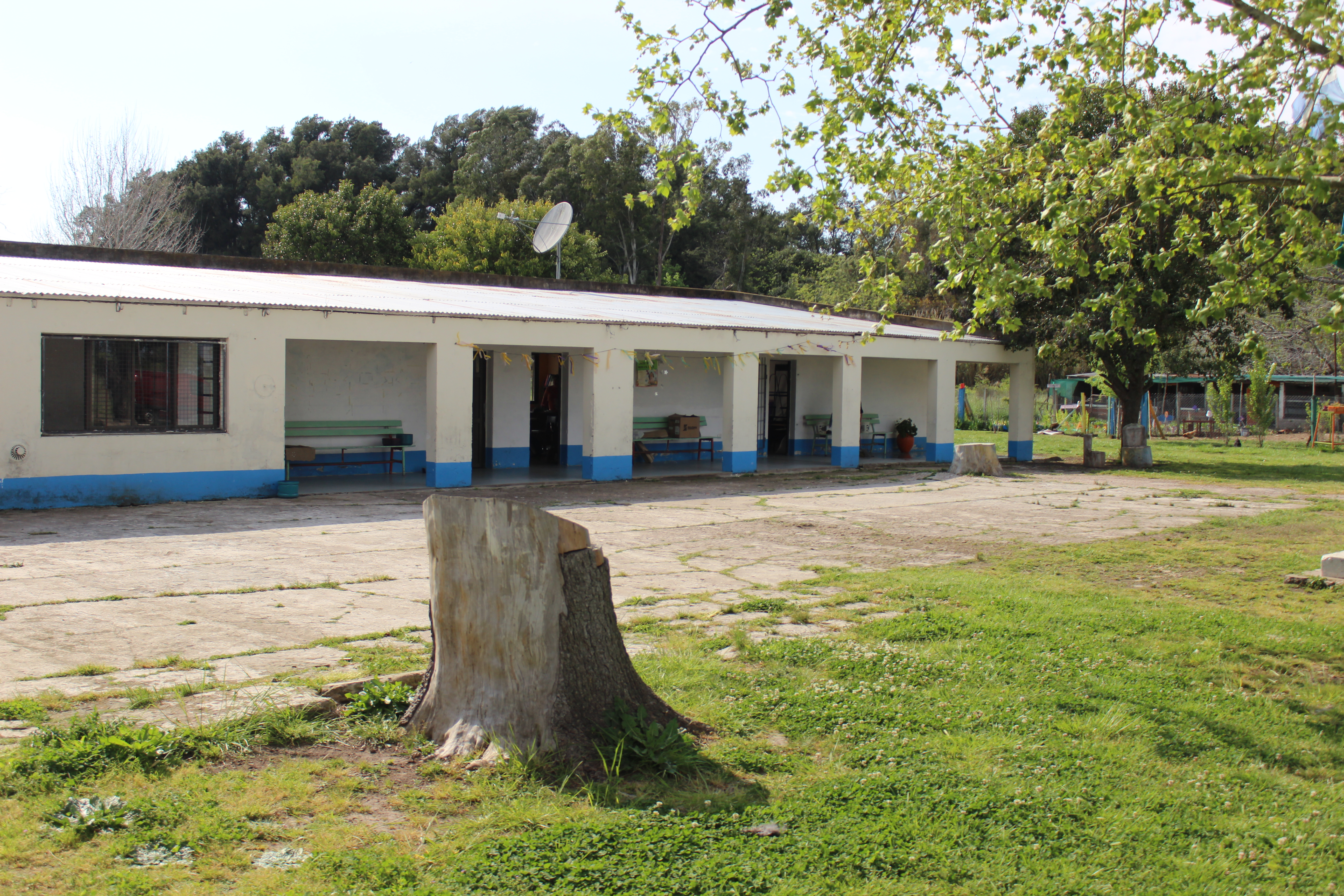 ep21